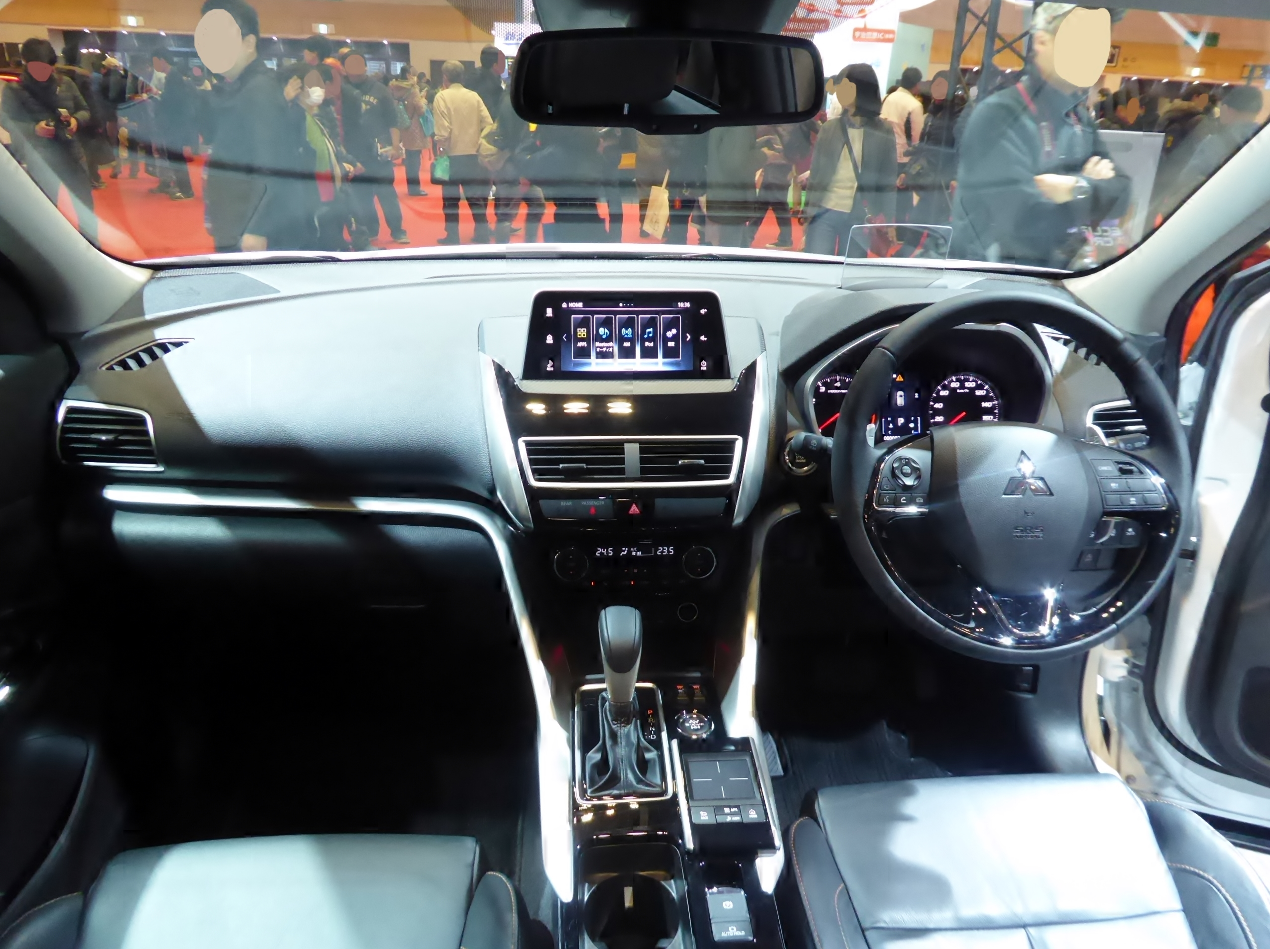 大阪モーターショー2017に於いて三菱・エクリプスクロスを撮影。